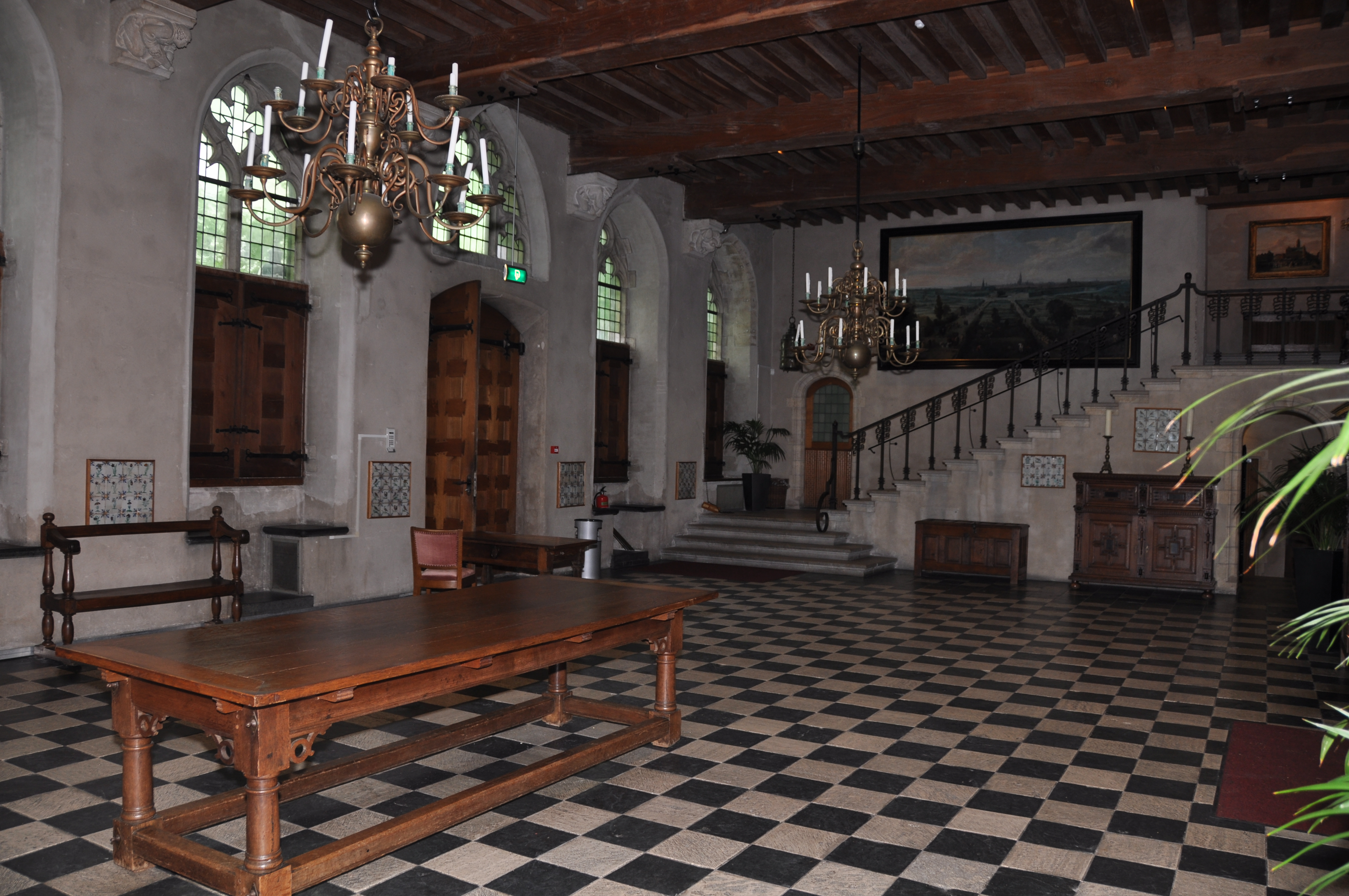 Zicht op een deel van het interieur van het stadhuis in Middelburg